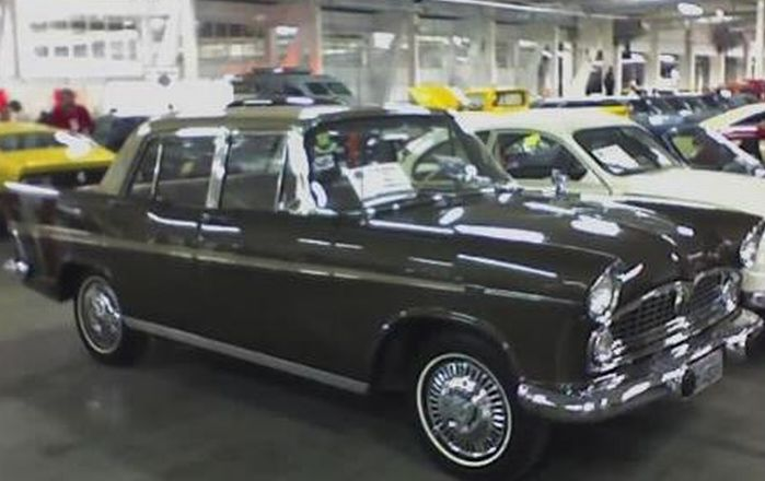 Automóvel Simca Tufão, 1964, fabricado no Brasil.